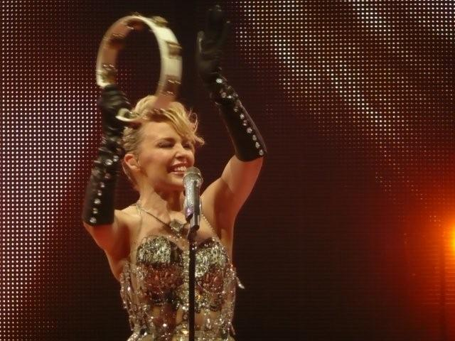 KylieX2008